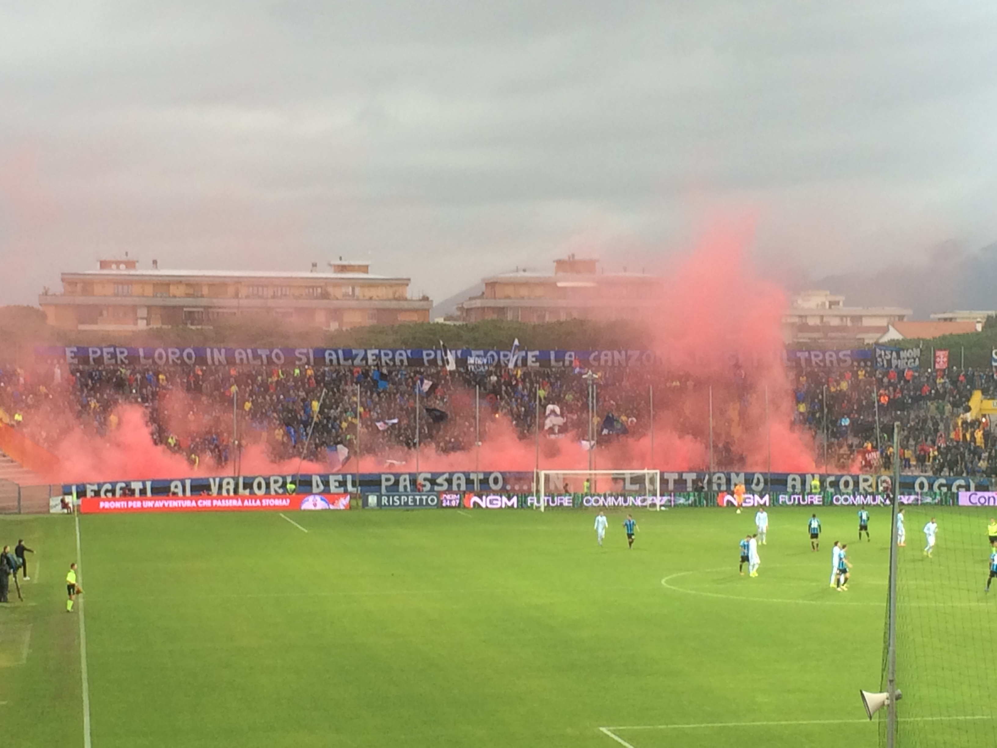 Pisa, stadio Arena Garibaldi - Romeo Anconetani, 2017. Coreografia dei tifosi pisani vista dalla curva Sud.